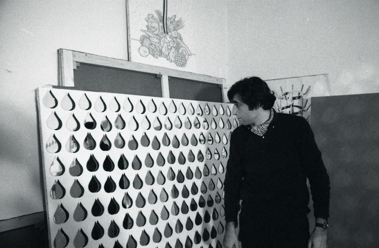 Servizio fotografico : Bologna, 1969 / Paolo Monti. - Strisce: 1, Fotogrammi complessivi: 6 : Negativo b/n, gelatina bromuro d'argento/ pellicola ; 35 mm. - ((I fotogrammi hanno una doppia numerazione. . - Sul portanegativi: Nikon FPa. - Occasione: Documentazione opere per Galleria Dè Foscherari. - Fonte: Fattura di Paolo Monti: IV. Commesse/ Fattura (1969/03/05), presso Archivio Paolo Monti